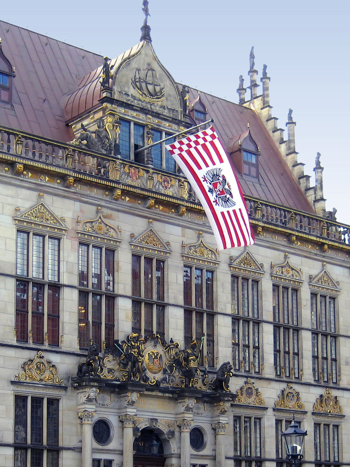 Teilansicht von Haus Schütting am Bremer Marktplatz, Sitz der Handelskammer Bremen (hier mit Flaggenschmuck am Tage der 467. Schaffermahlzeit 2011). Details an der Marktfront: Schiffsgiebel mit Koggen-Motiv, Bremische Flagge mit dem Bremer Kaufmannswappen sowie Schmuckgiebel über dem Eingangsportal mit dem Bremer Kaufmannswappen.